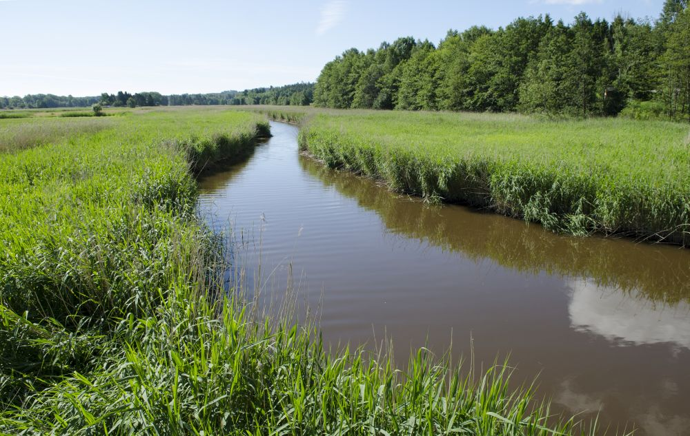 Hemskilen, på grensen mellom Sandefjord og Larvik.